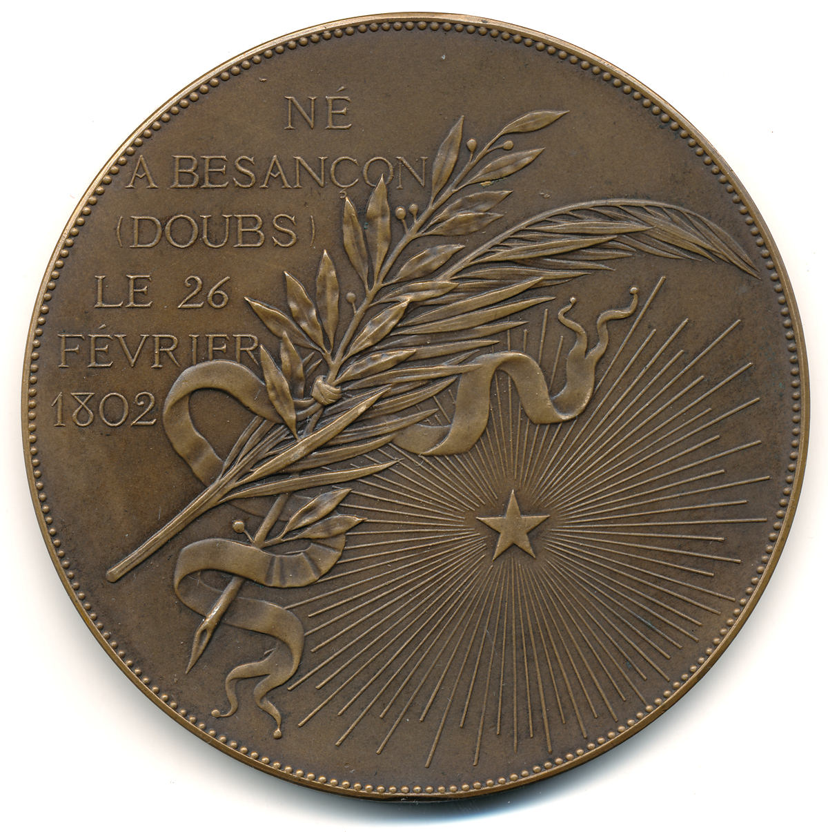 Médaille à l'effigie de Victor Hugo, œuvre de A. Borrel, 1884, Bronze, 68mm, revers naissance à Besançon